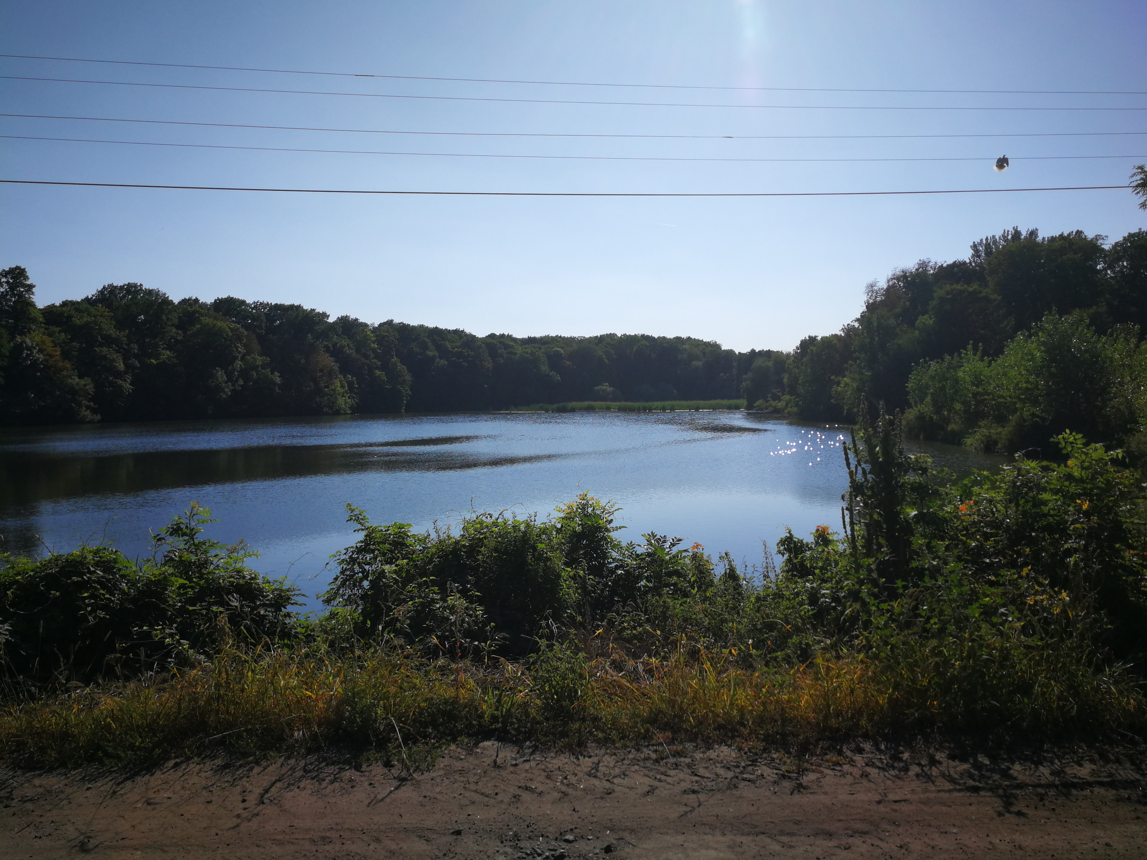 Blahotický rybník, okres Kladno, Česká republika.